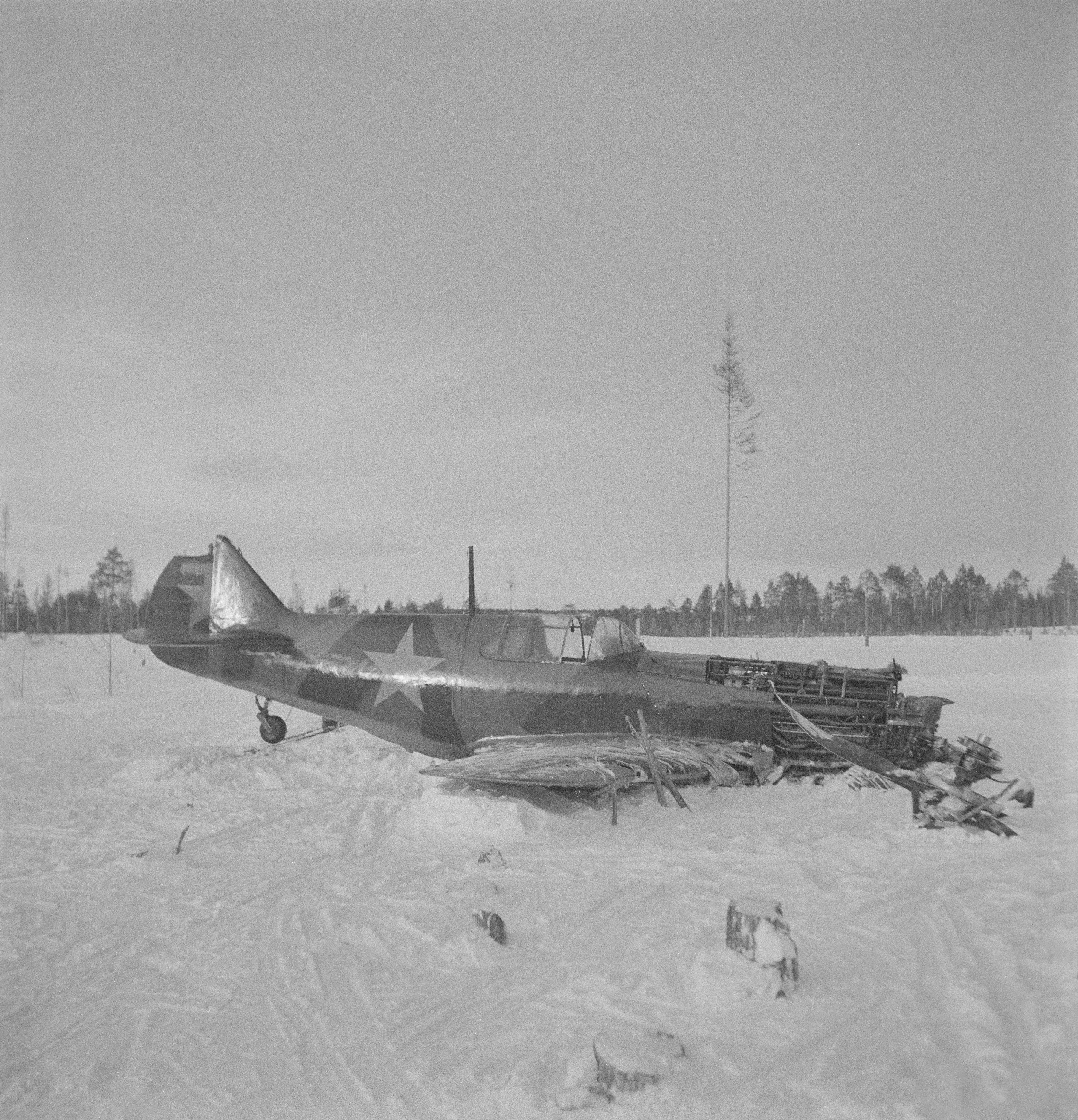 Ilmatorjunnan pudottama ryssän hävittäjä Nurmoilan metsässä. Kone oli melko hyvässä kunnossa. (Kuvassa on Lavotskin LaGG-3). Kuvauspaikka: Nurmoila